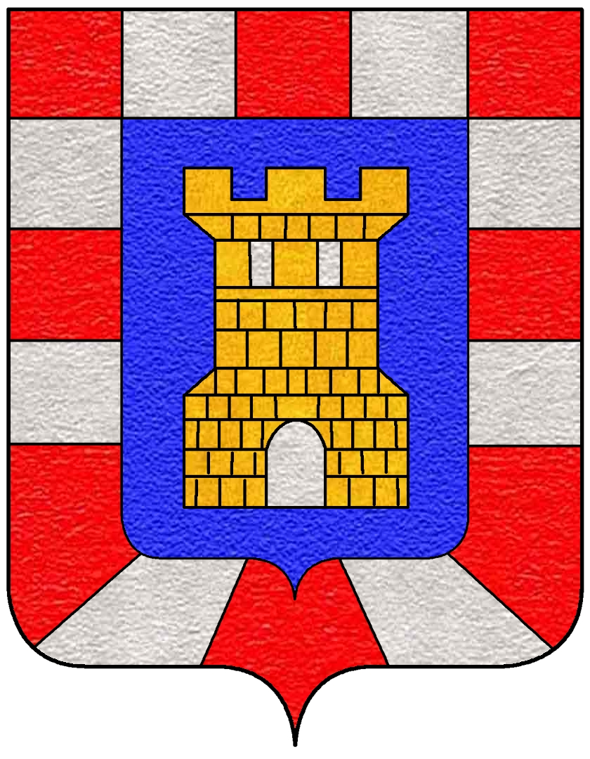 Stemma della famiglia Asinari